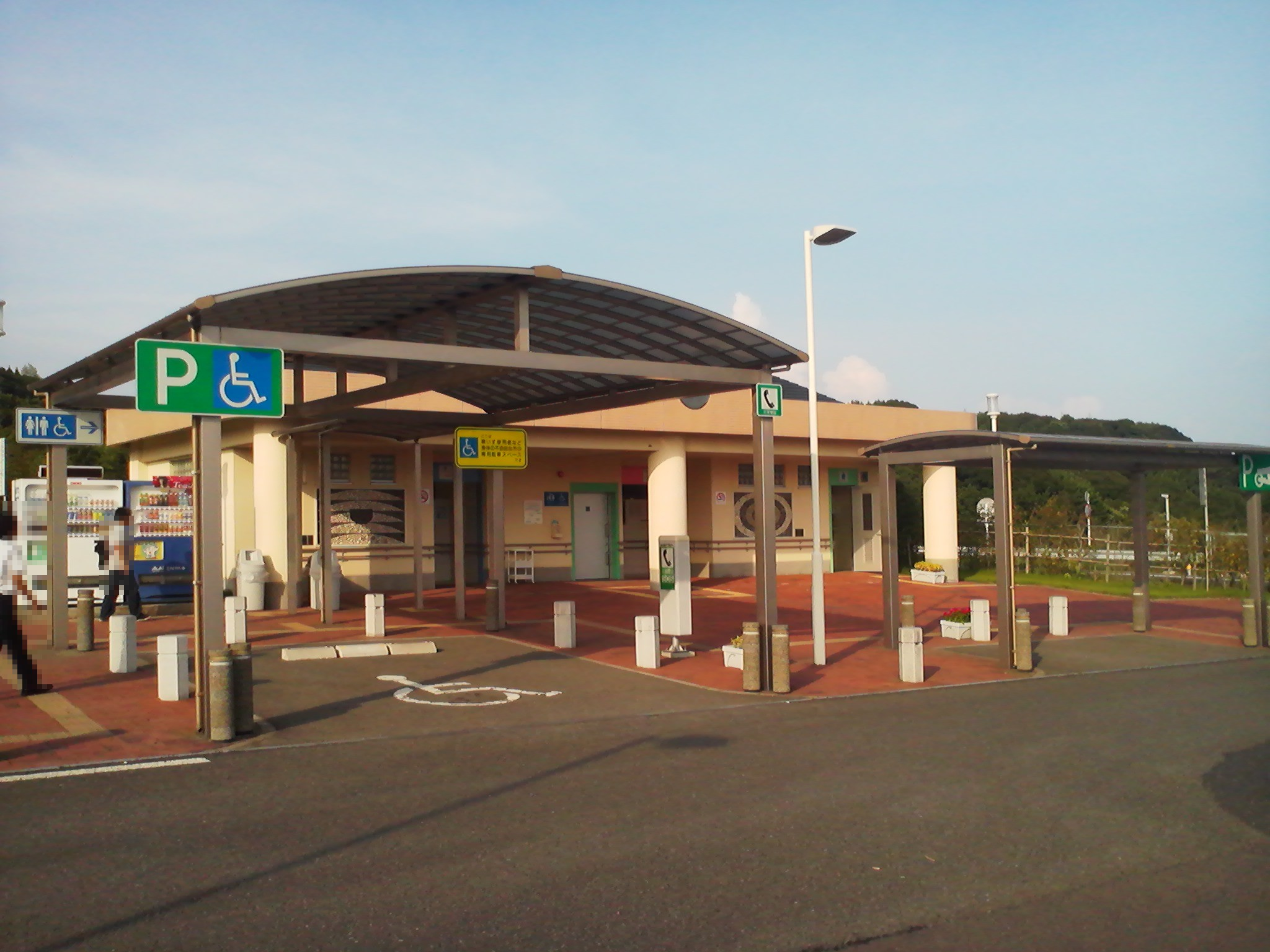 美山パーキングエリア下り線の外観